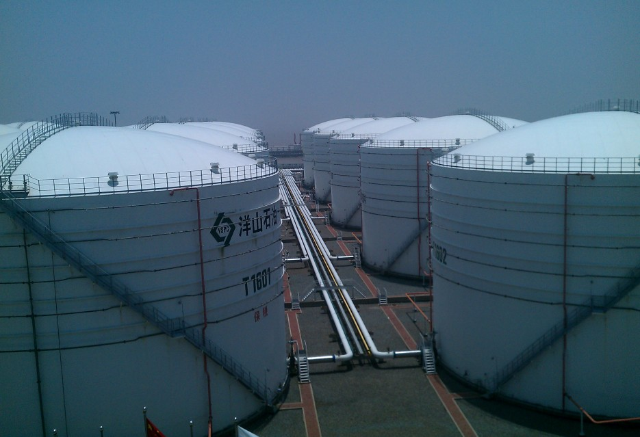 中文（中国大陆）: 该油库的内浮顶储油罐